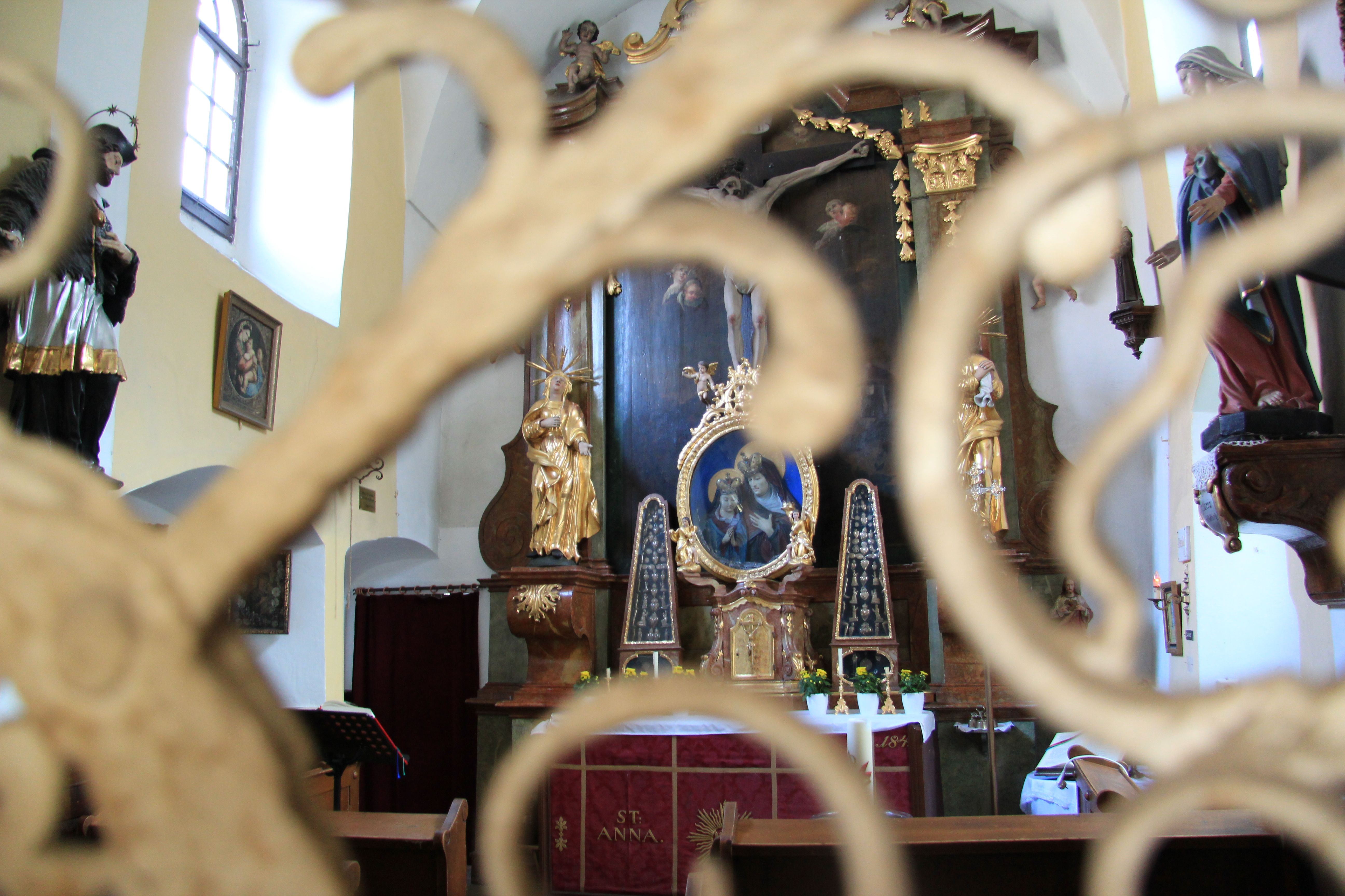 Miethaus, ehem. Bürgerspital, Annakapelle